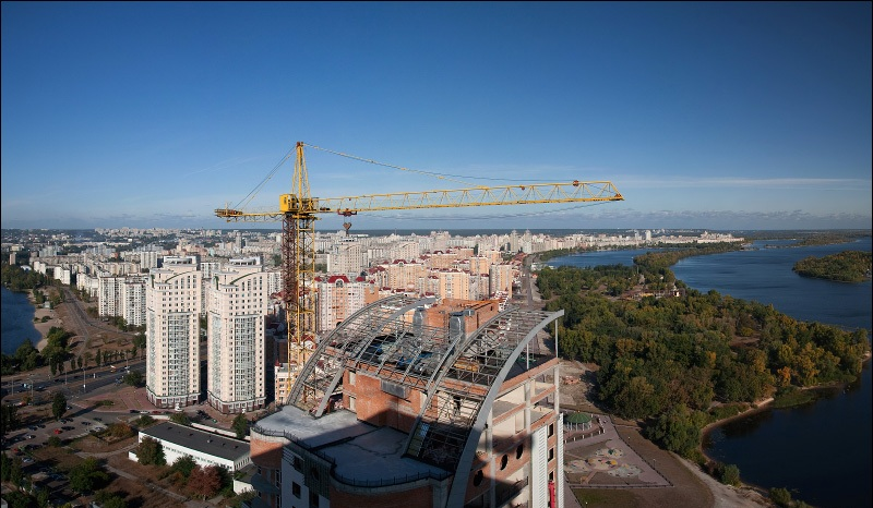 Вид на Оболонь (Киев)